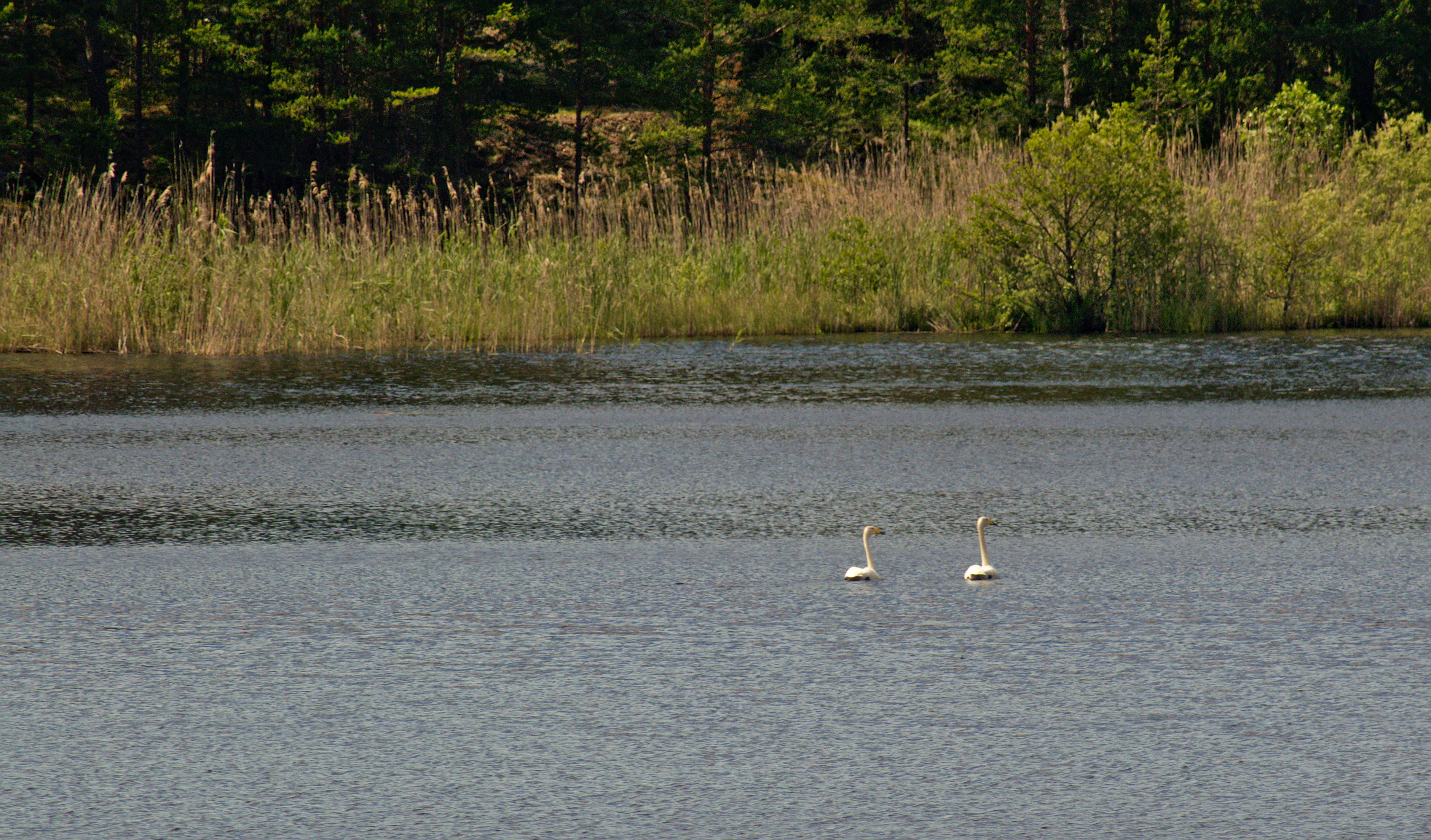 Sjön Hålsjön på Ornö i Stockholms skärgård. Sångsvanar i sjön.